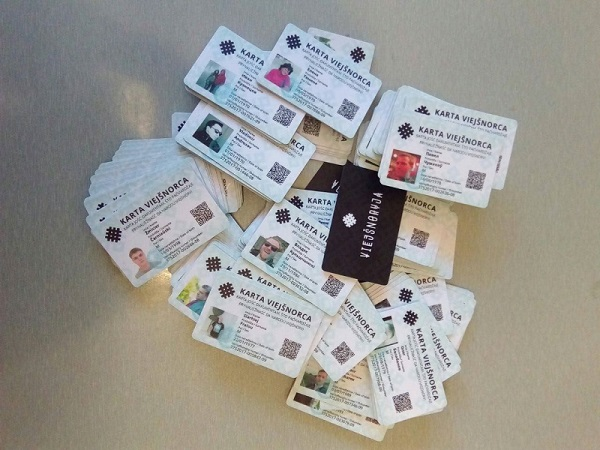 Беларуская (тарашкевіца): Карта Вейшнорца